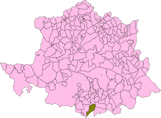 Almoharín